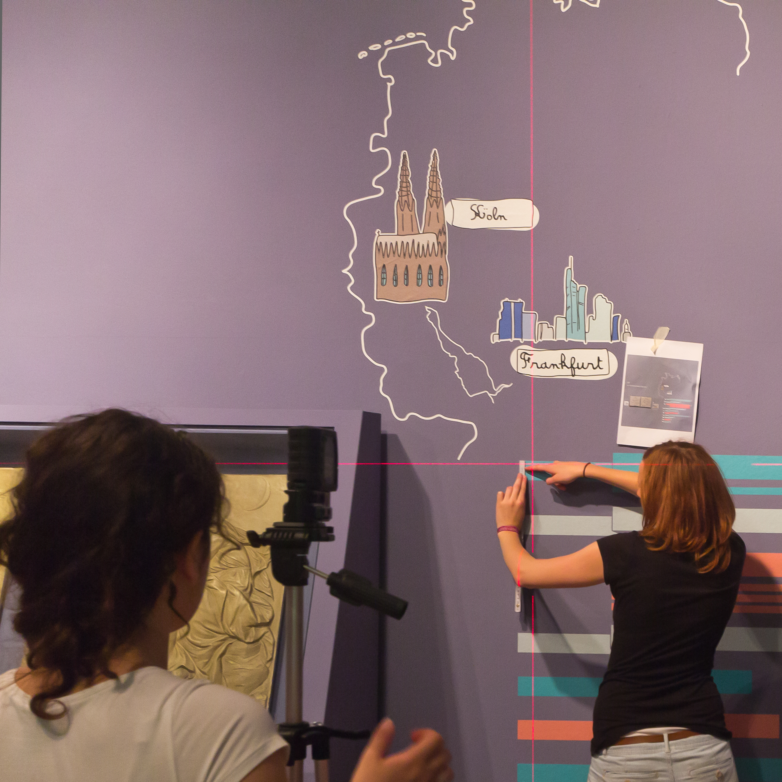 Kölnisches Stadtmuseum. Sonderausstellung in der Alten Wache zum 125. Geburtstag: „125 x gekauft - geschenkt - gestiftet“. Foto: Mit einem Bosch GLL 2 Professional Kreuz-Linienlaser wird ein rotes Kreuz aus Laserlicht auf eine Wand geworfen. Das Lichtkreuz dient zur exakten Ausrichtung der Ausstellungsbeschriftung an der Wand.